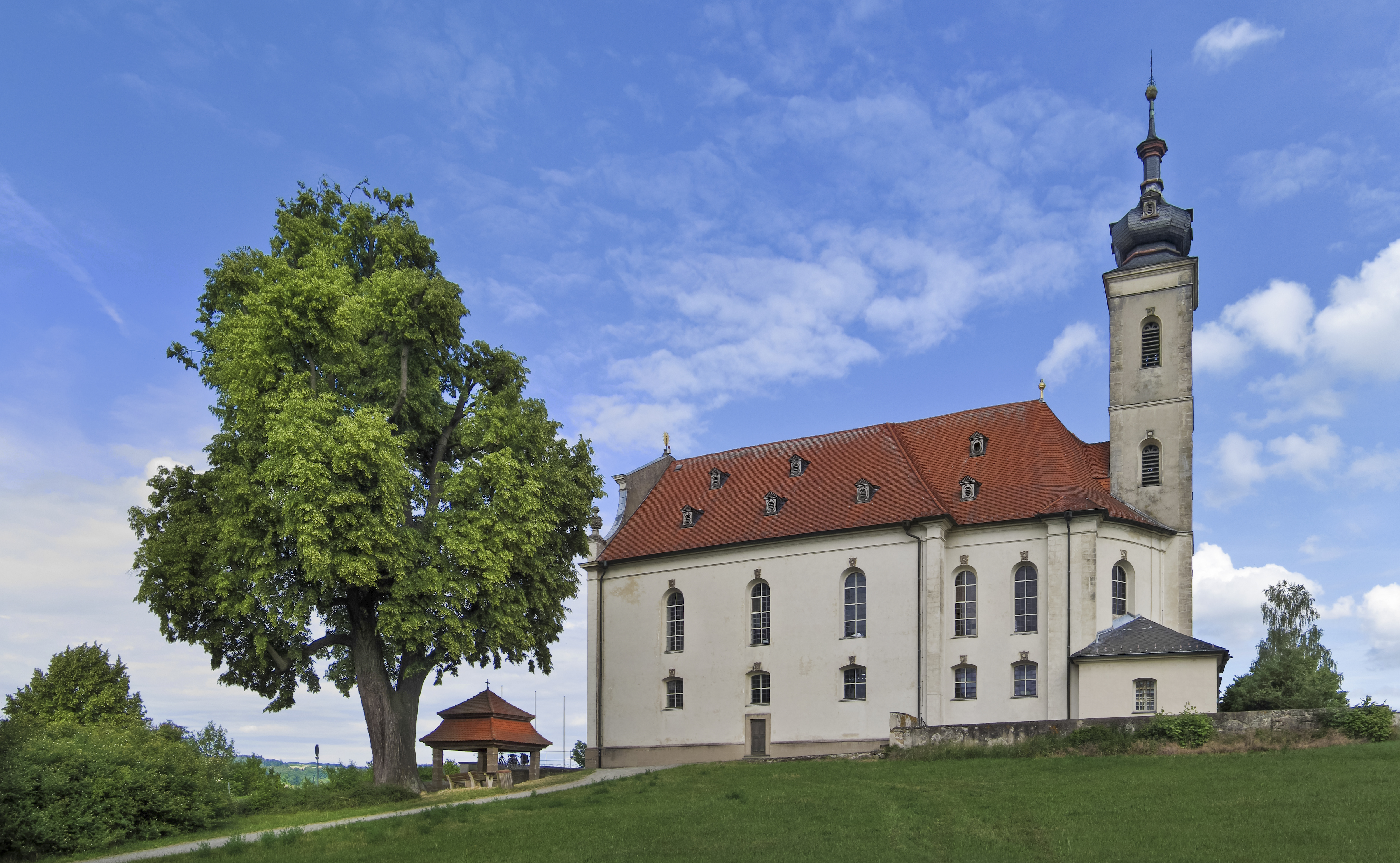 Wallfahrtskirche Maria Limbach in der Nähe von Limbach (Eltmann), unweit des linken Ufers des Mains. Erbaut wurde die Kirche von 1751 bis 1755 nach Plänen von Balthasar Neumann. Daneben eine Sommer-Linde (Tilia platyphyllos) mit einem Stammumfang von 6,49 Meter in Brusthöhe im Jahre 2011.